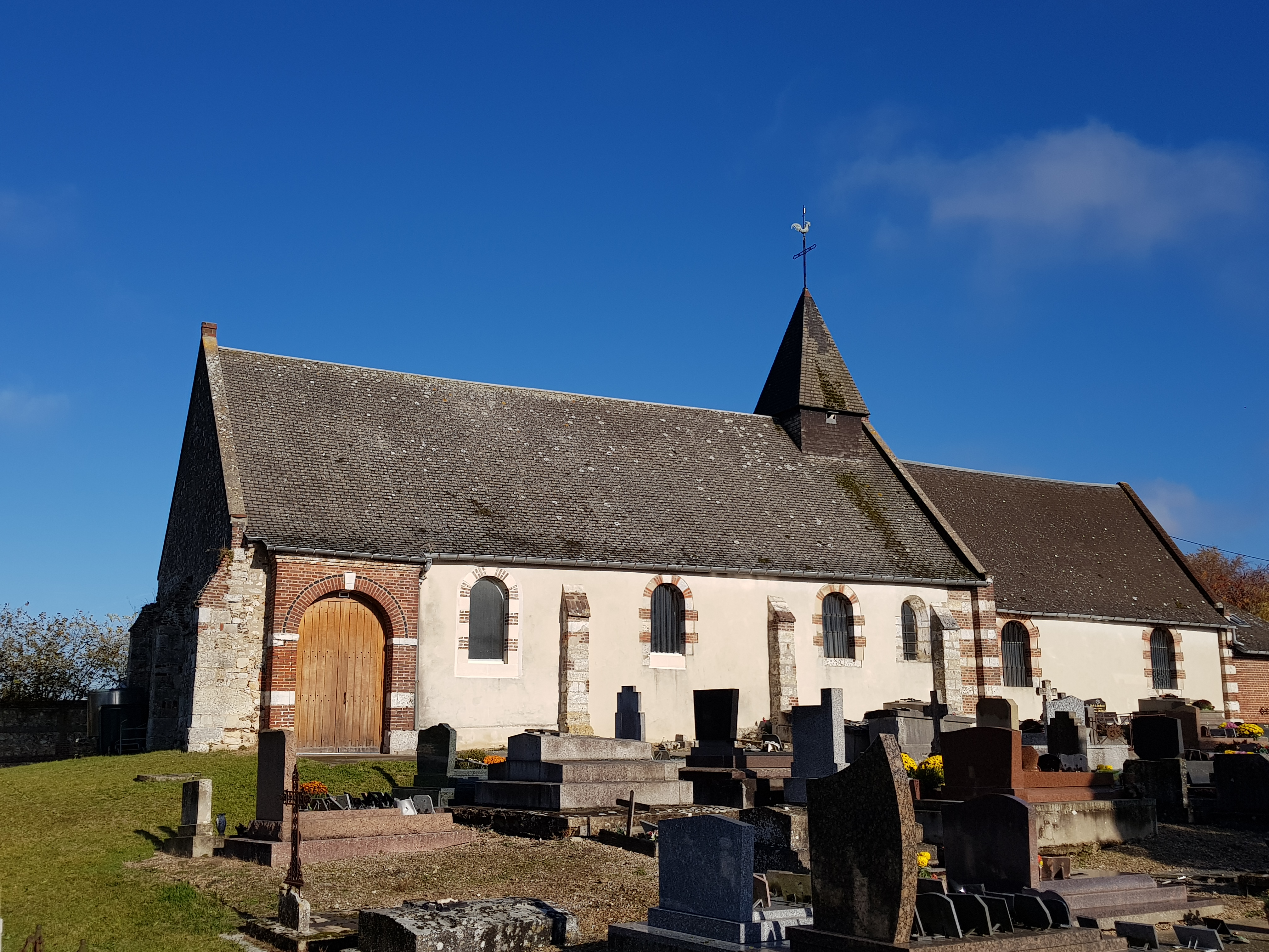 Église de Saint-Aubin-sur-Quillebeuf - Eure - Normandie - France